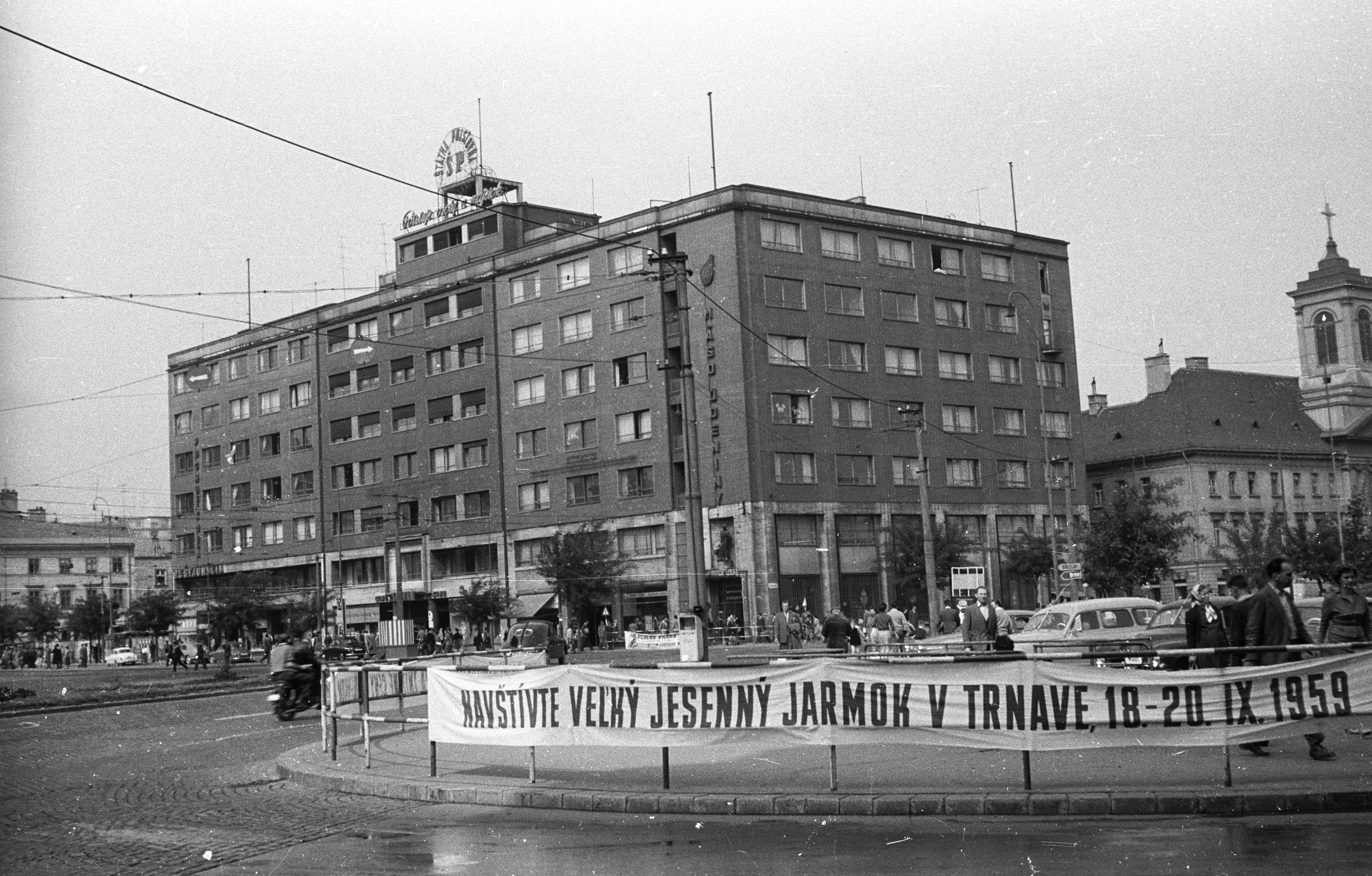 balra a námestie Slovenského národného povstania (egykor Vásár tér), jobbra a Spitalská (Kórház) utca a Dunajska (Duna) utca felől nézve. Location: Slovakia, Bratislava Tags: Czechoslovakia, street view Title: balra a námestie Slovenského národného povstania (egykor Vásár tér), jobbra a Spitalská (Kórház) utca a Dunajska (Duna) utca felől nézve.